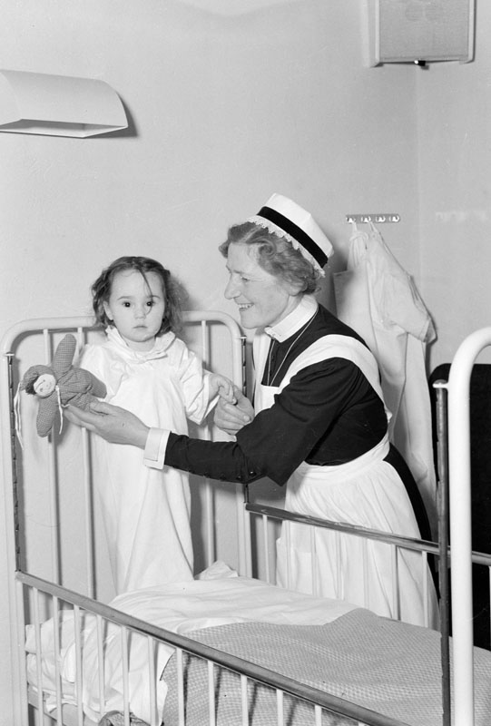 Invigning av Barnsjukhuset Samariten, Ringvägen, Beteckning: Fotonummer SvD 23390